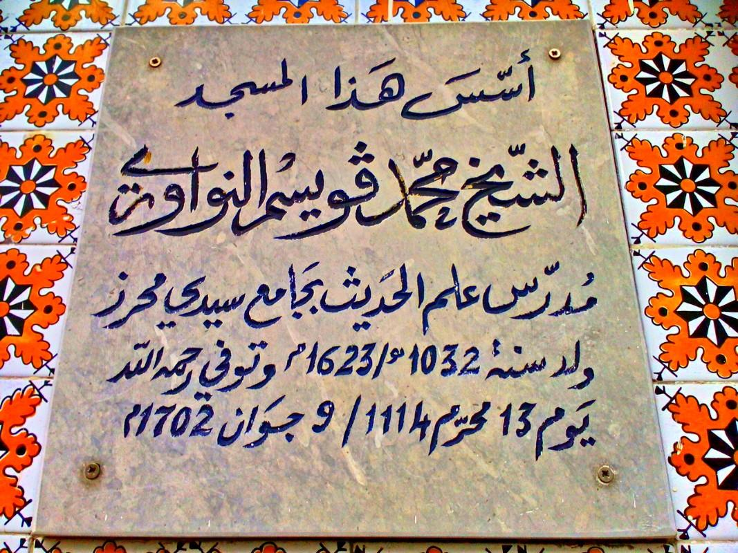 Rue Naceur Ben Jafar, Tunis, Tunisie نهج الناصر بن جعفر, تونس العاصمة ، تونس